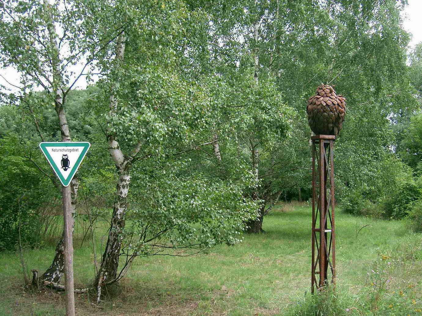 Natur-Park Südgelände auf dem Gebiet des ehemaligen Bahnhofes Berlin-Tempelhof Rbf (Schild Naturschutzgebiet und Skulptur Eule)